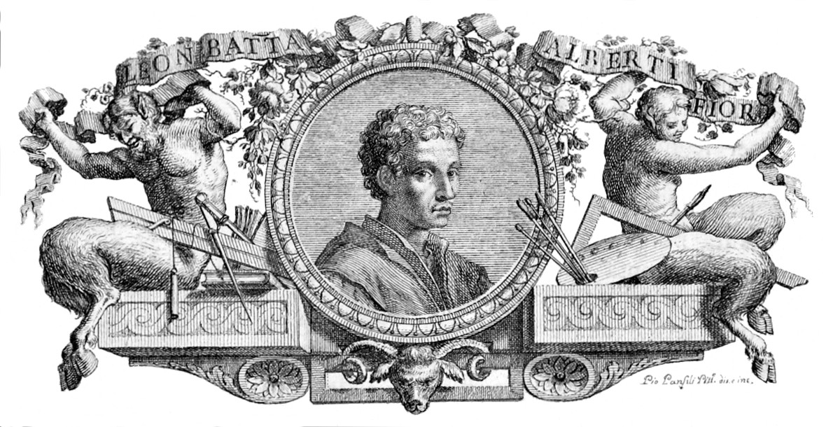 Stampa calcografica da Alberti, Leon Battista, Della architettura della pittura e della statua, Bologna, 1782. Testatina, p. v.